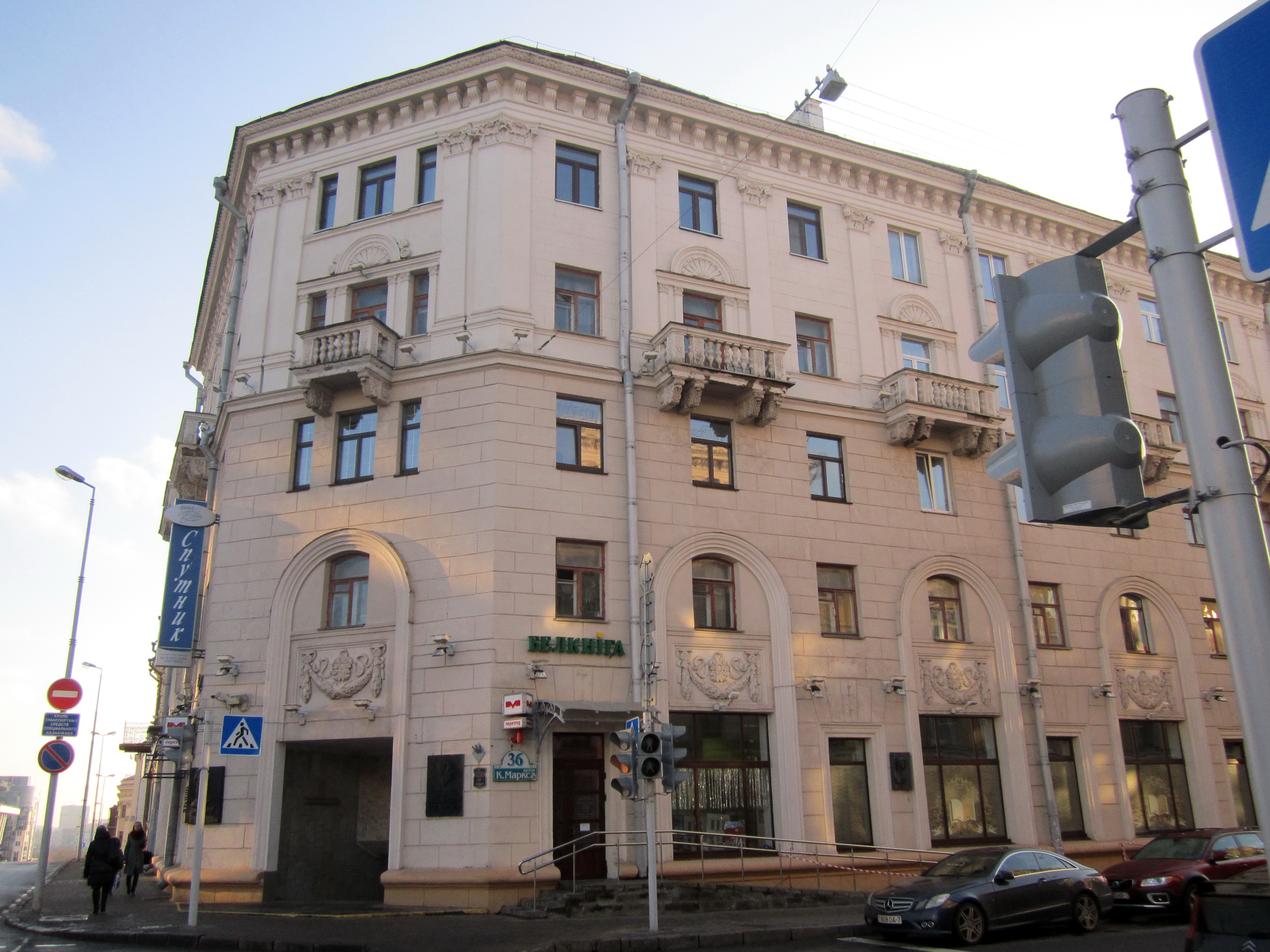 Дом Маналіт, Мінск, вул. К. Маркса, 36. Дом, у якім жылі беларускія пісьменнікі Я. Маўр, Ўл. Караткевіч, і інш..